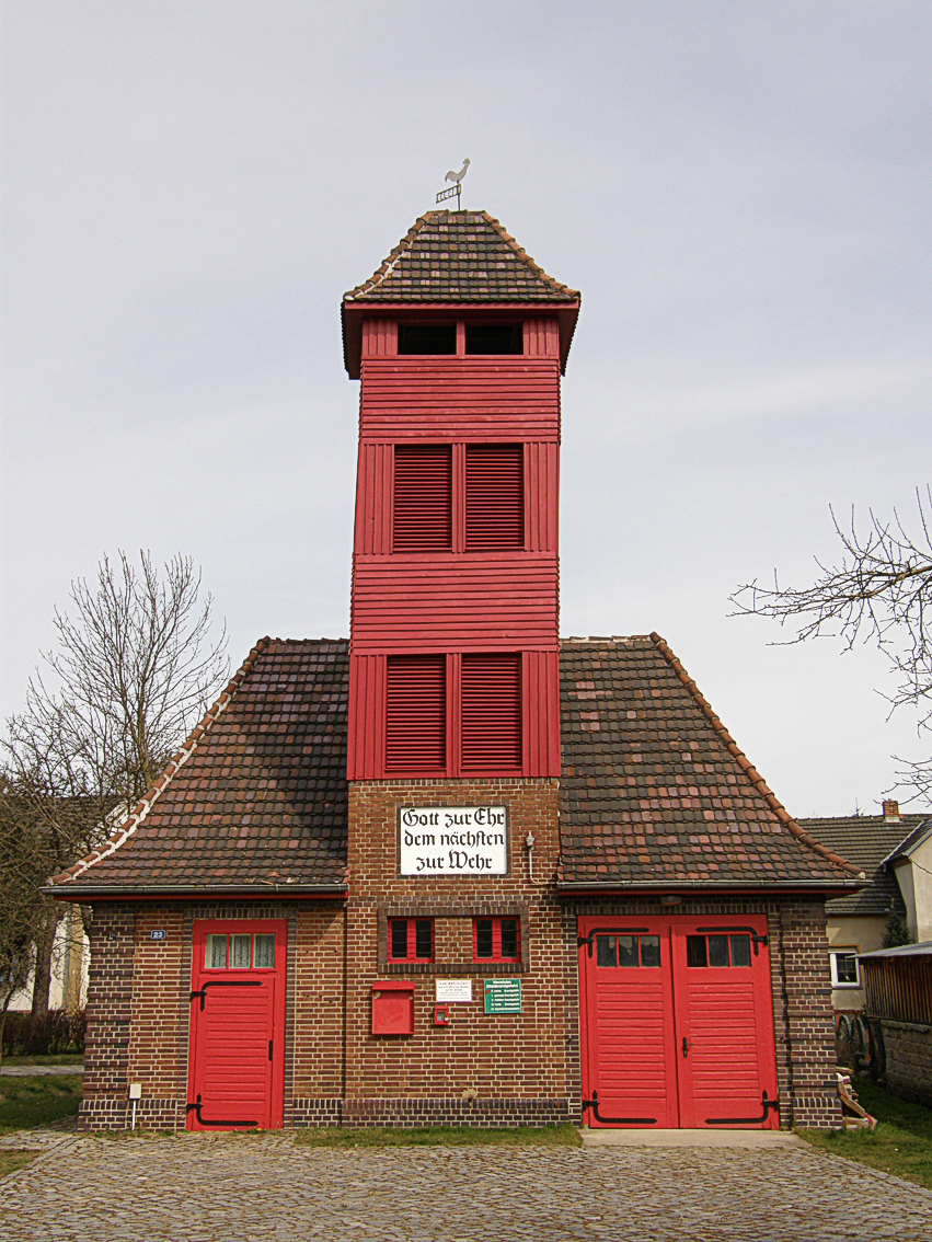 Die Feuerwehr in Muschen (Spreewald)